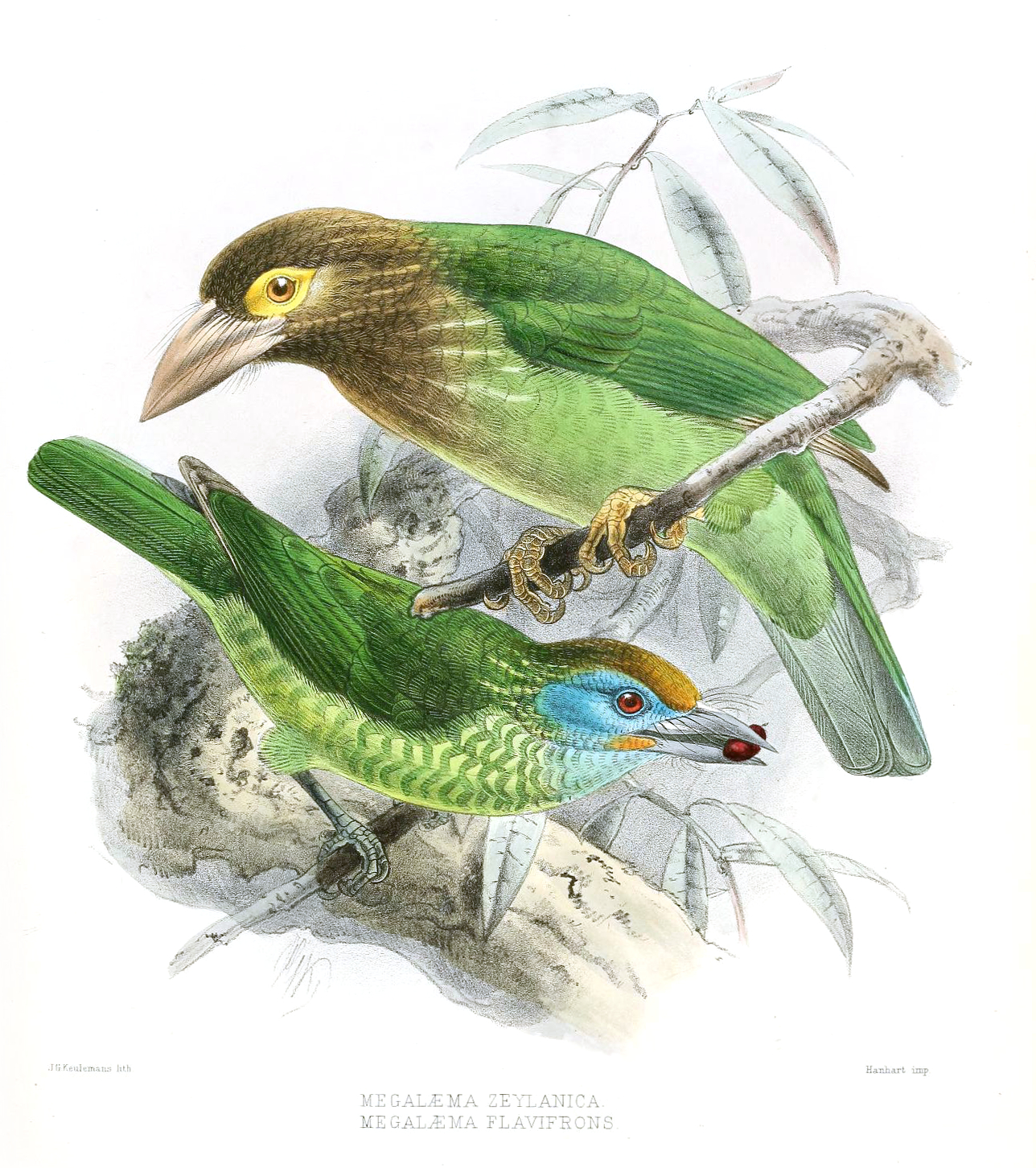 Megalaima zeylanica, Megalaima flavifrons